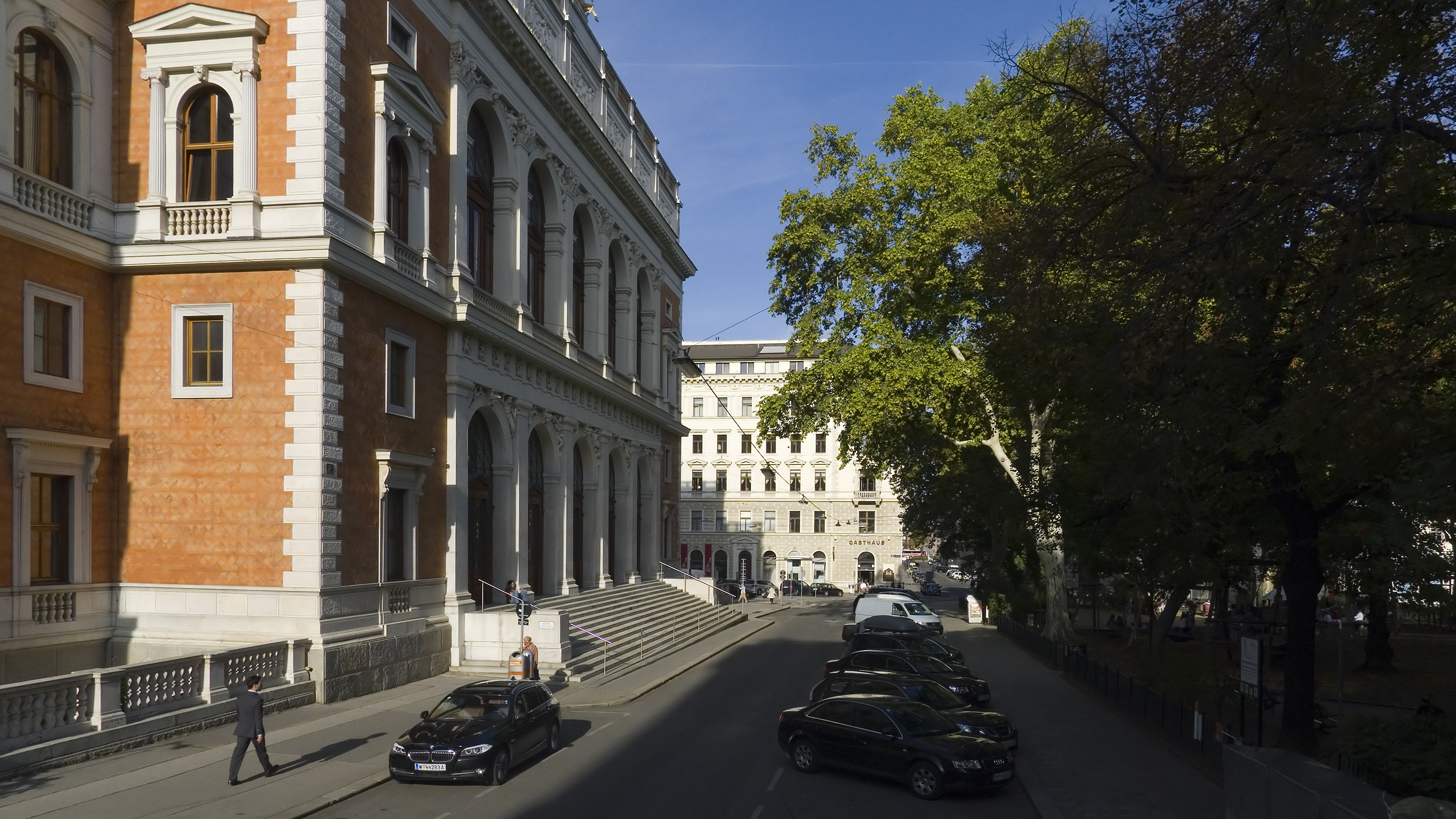 Börseplatz in Wien 1 bei Nr. 2 Richtung Nordosten